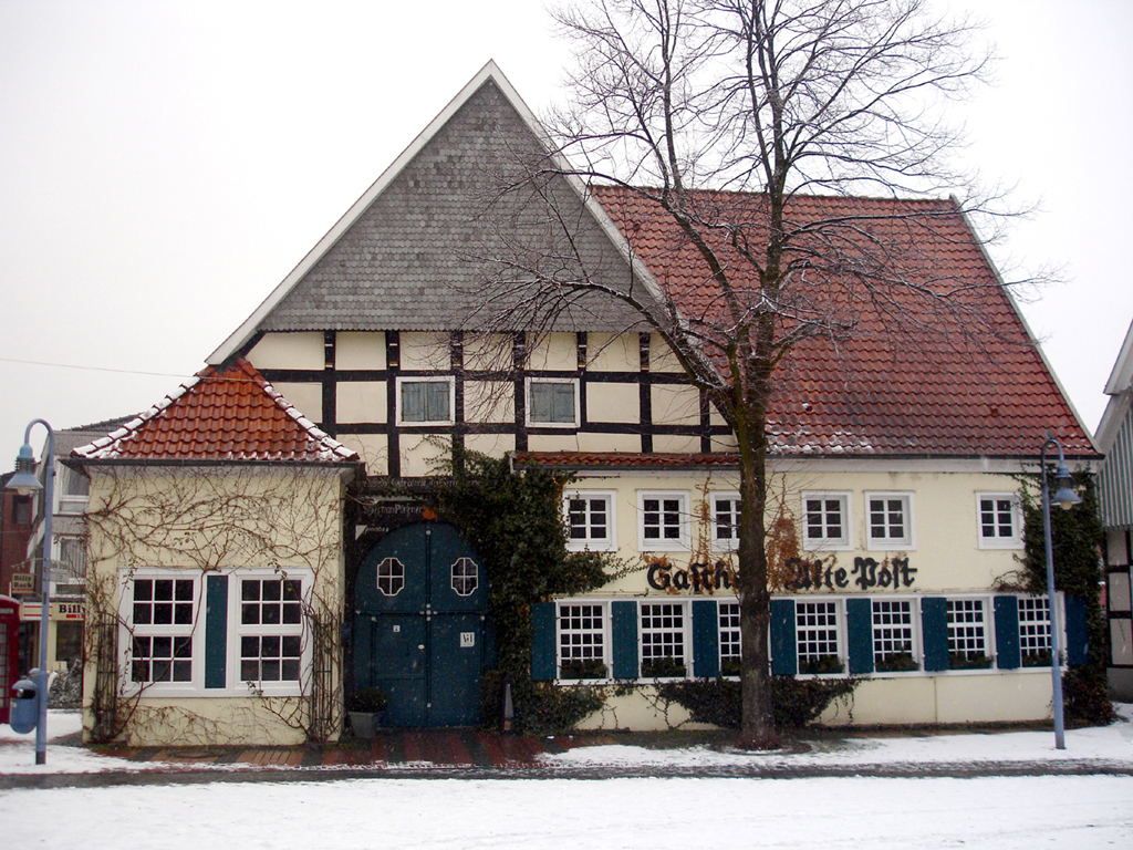 Die Alte Post (Bramsche / Osnabrücker Land) Fotografiert: 2006:02:05 15:22:05 TXm Kamera: SONY DSC-P200 Belichtungszeit 1/200 s Originale Auflösung: 3072x2304 Pixel